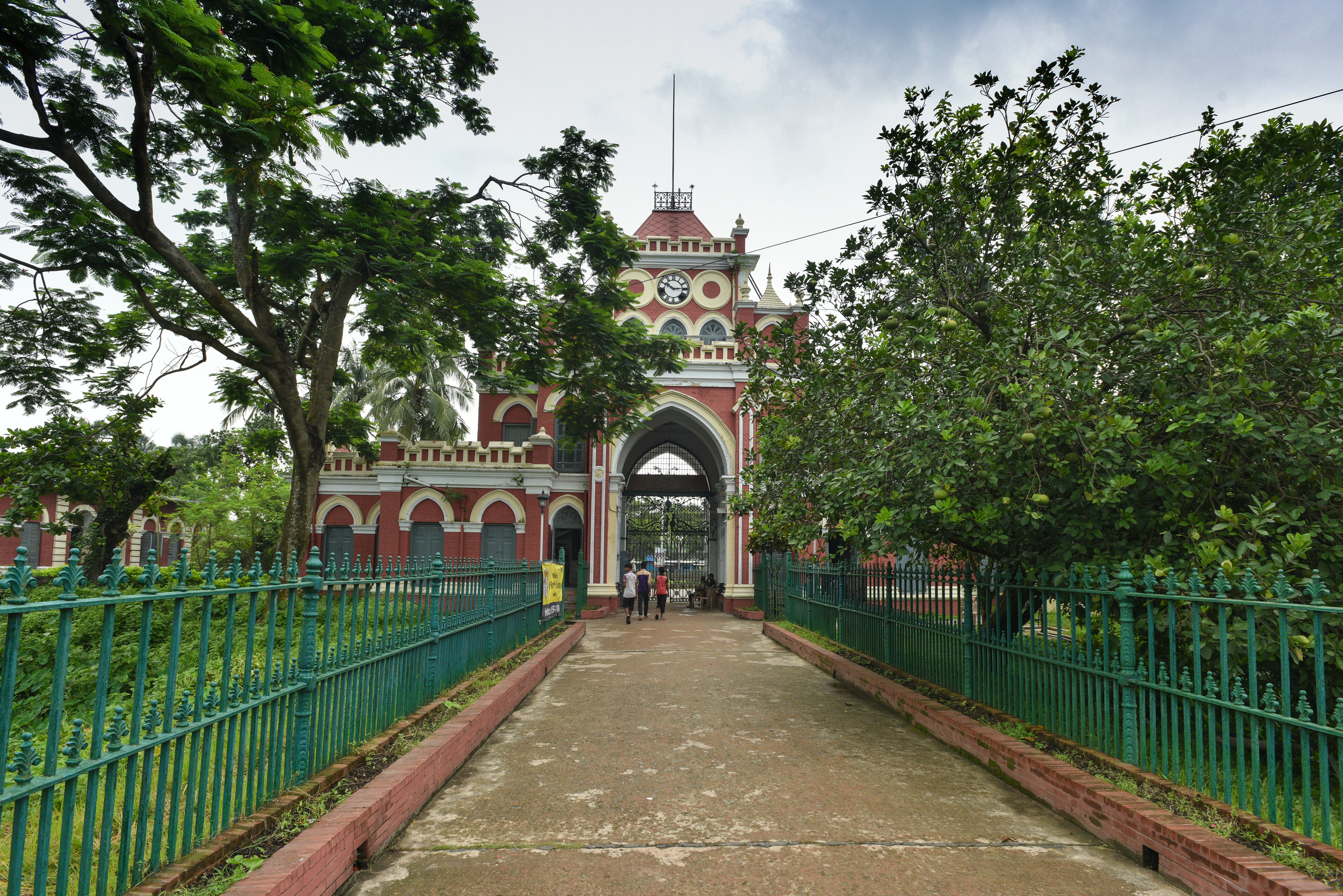 দিঘাপতিয়া রাজবাড়ি (উত্তরা গণভবন)